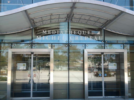 La Médiathèque Michel-Crépeau le 19 novembre 2011